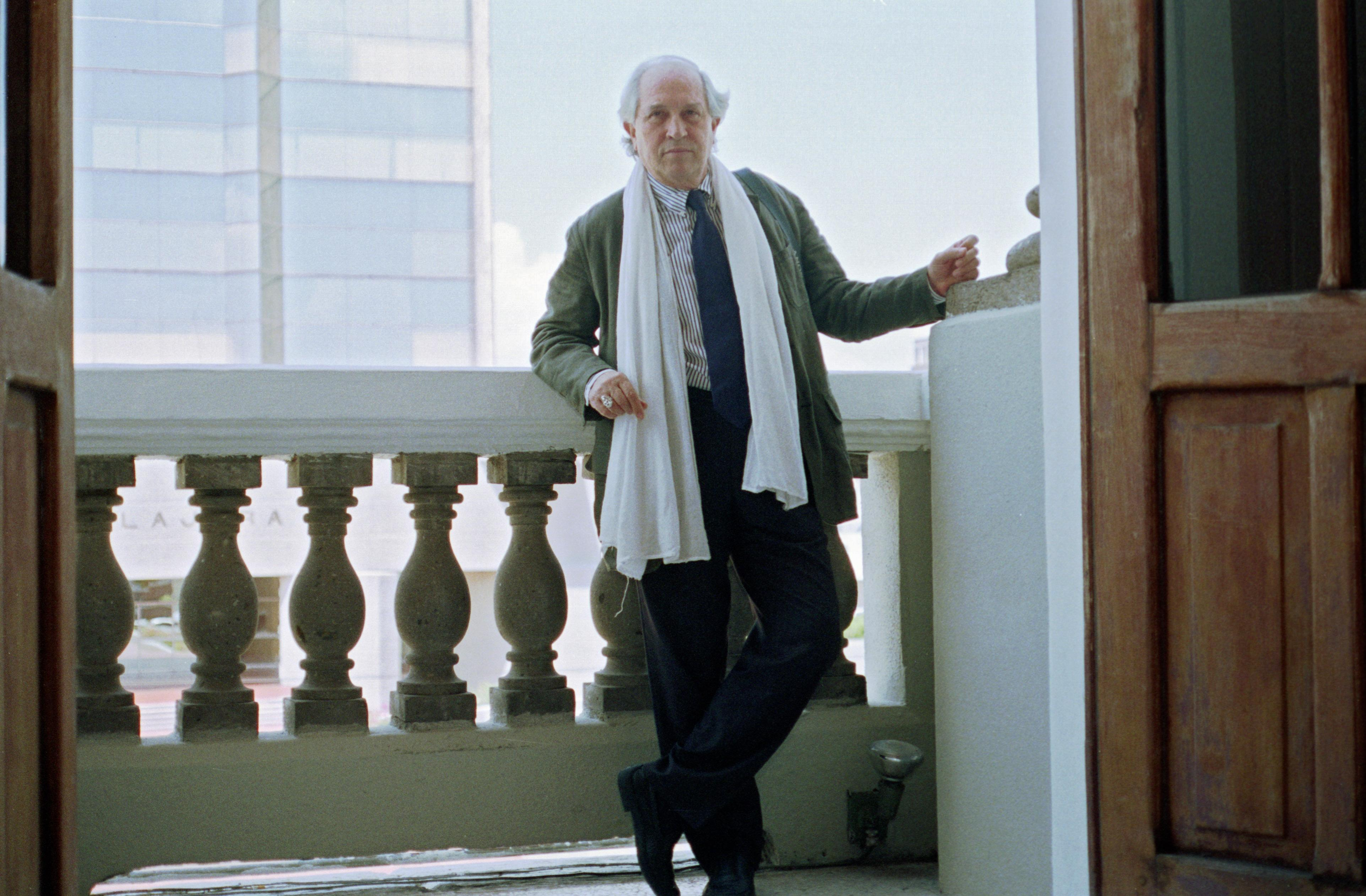 V. Storaro 02